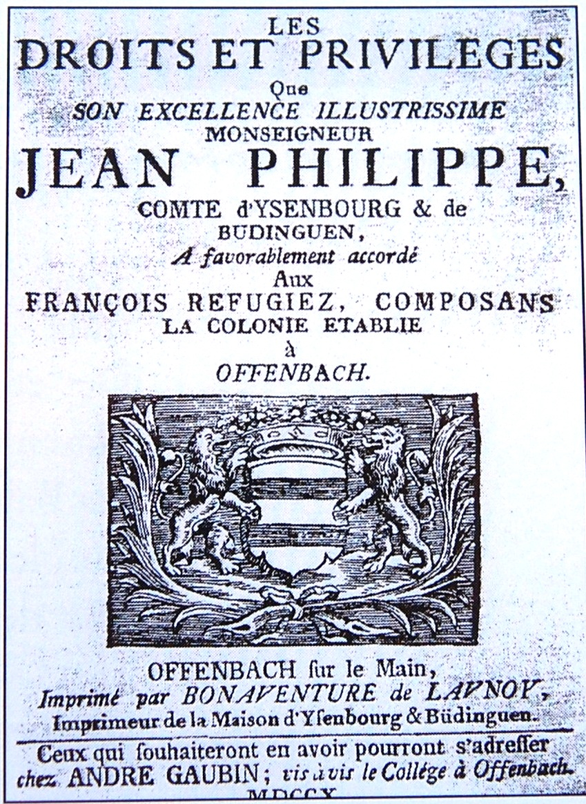 Durch Graf Johann Philipp von Isenburg an französische Hugenotten verliehene Sonderrechte (Privilegien)